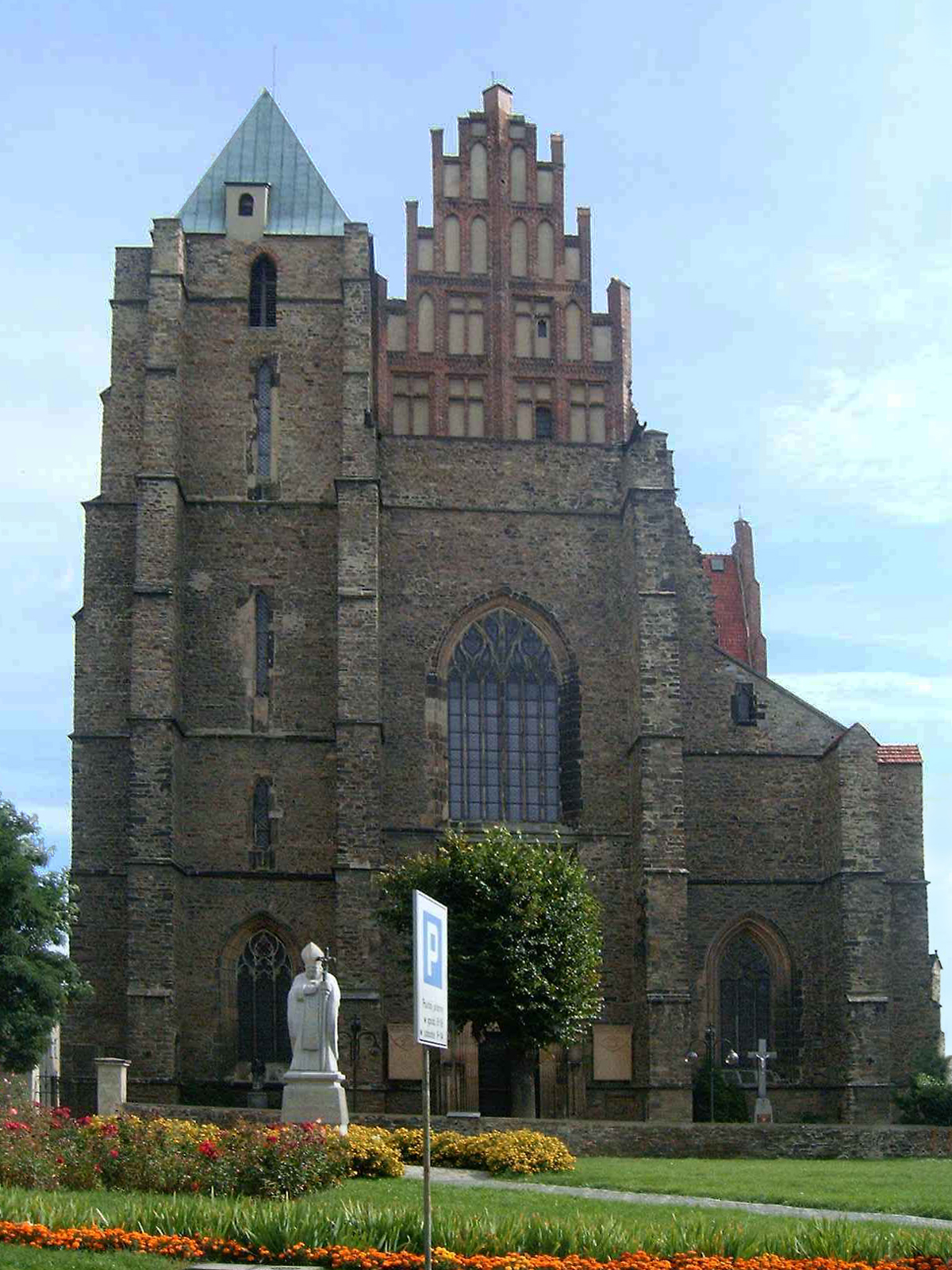 Kościół parafialny pw. Św. Piotra i Pawła Bazylika Mniejsza w Strzegomiu